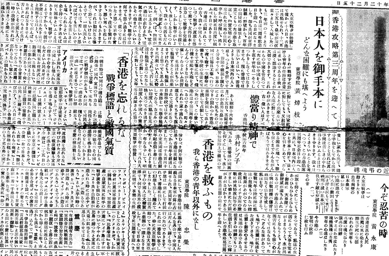 中文（香港）: 摘自《香港日報》日文版1944年12月25日。該報社已結束逾50年，因此沒有版權問題。